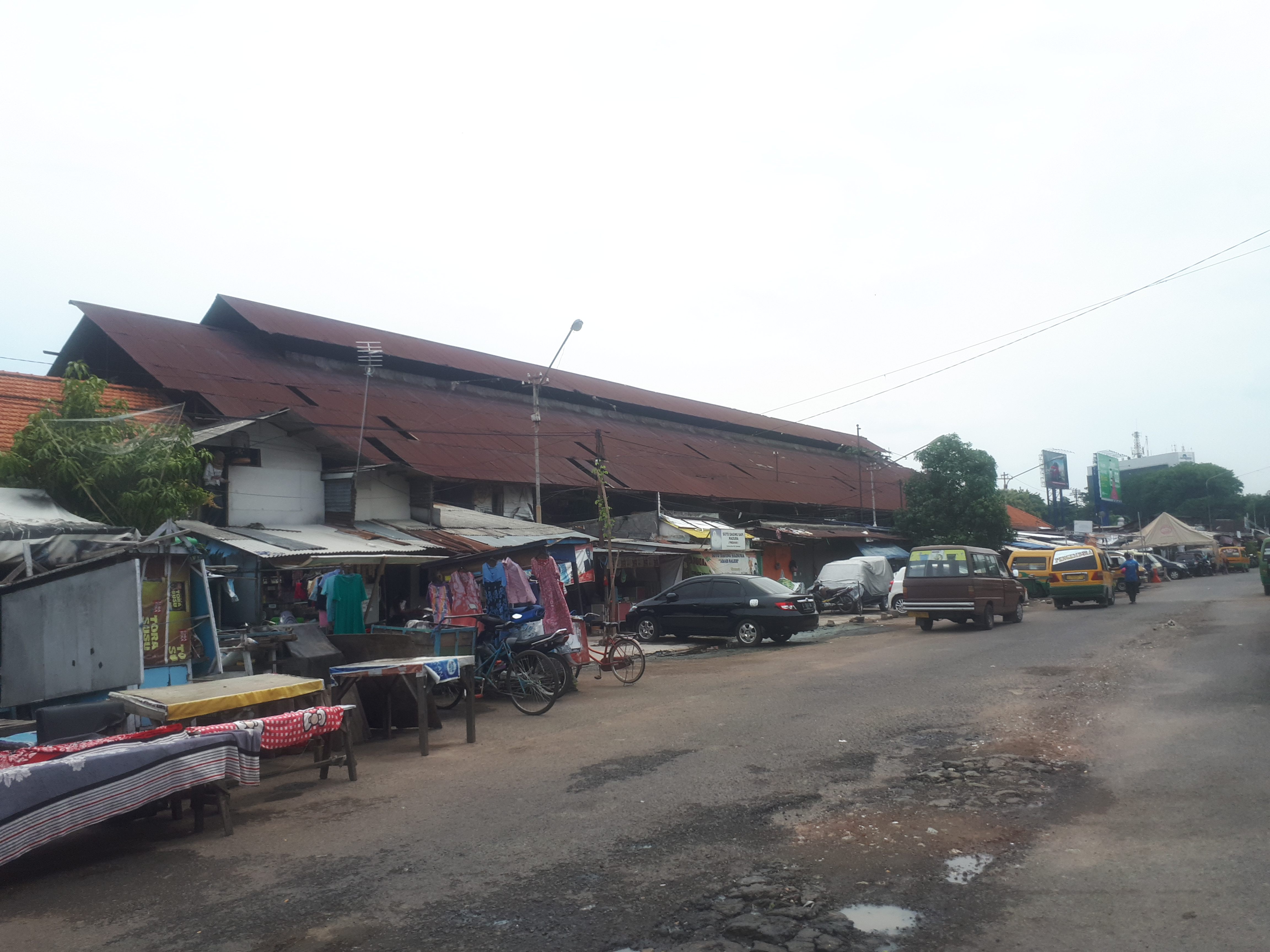 Tampak luar bekas Stasiun Wonokromo Kota tahun 2020